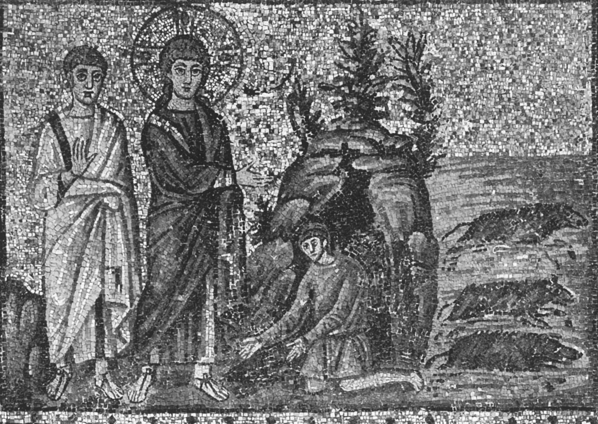 Sant' Apollinare Nuovo (Ravenna), Mosaik, Heilung des Besessenen